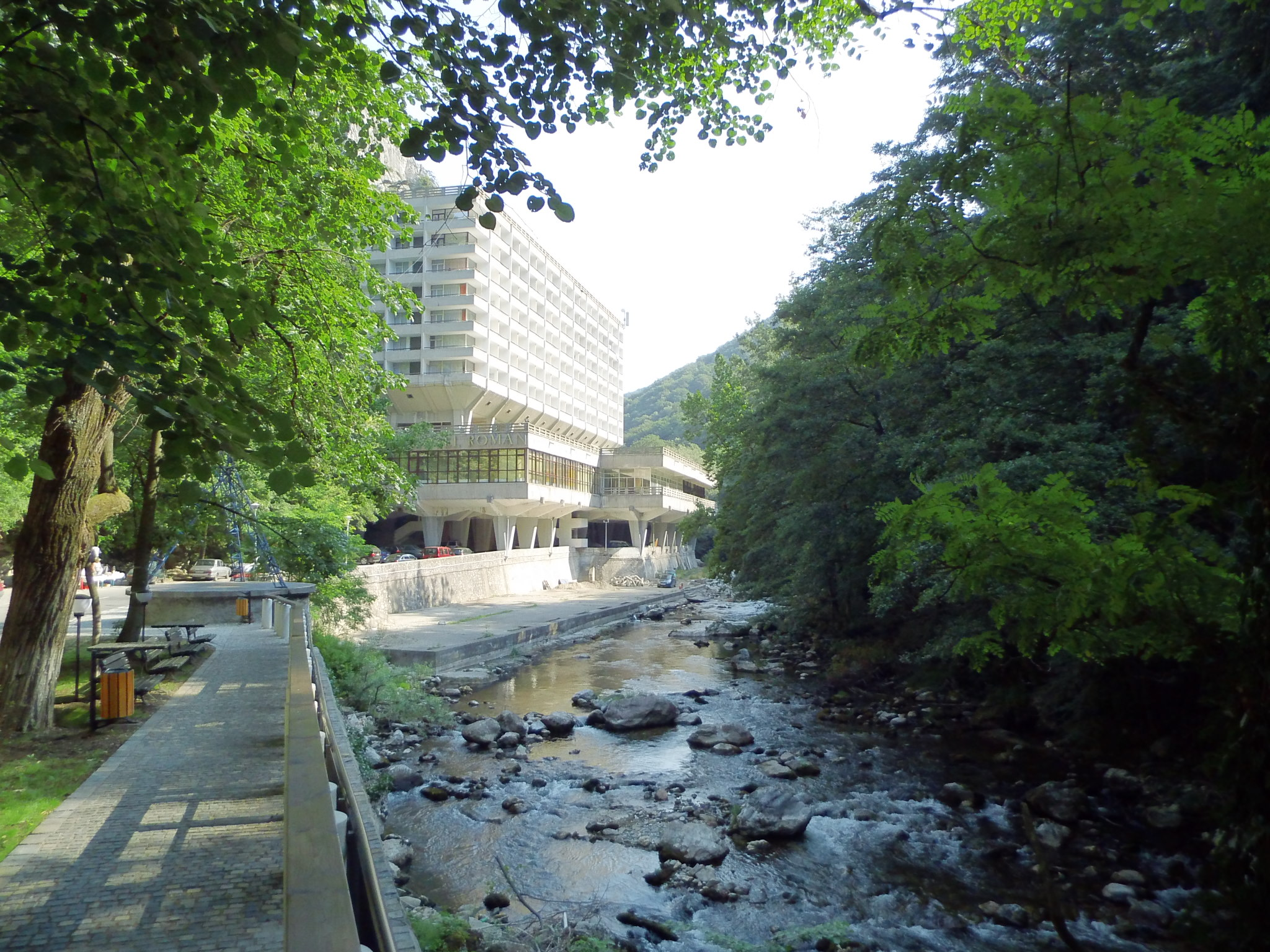 Lucrări de sistematizare, regularizare drumuri și zid sprjin